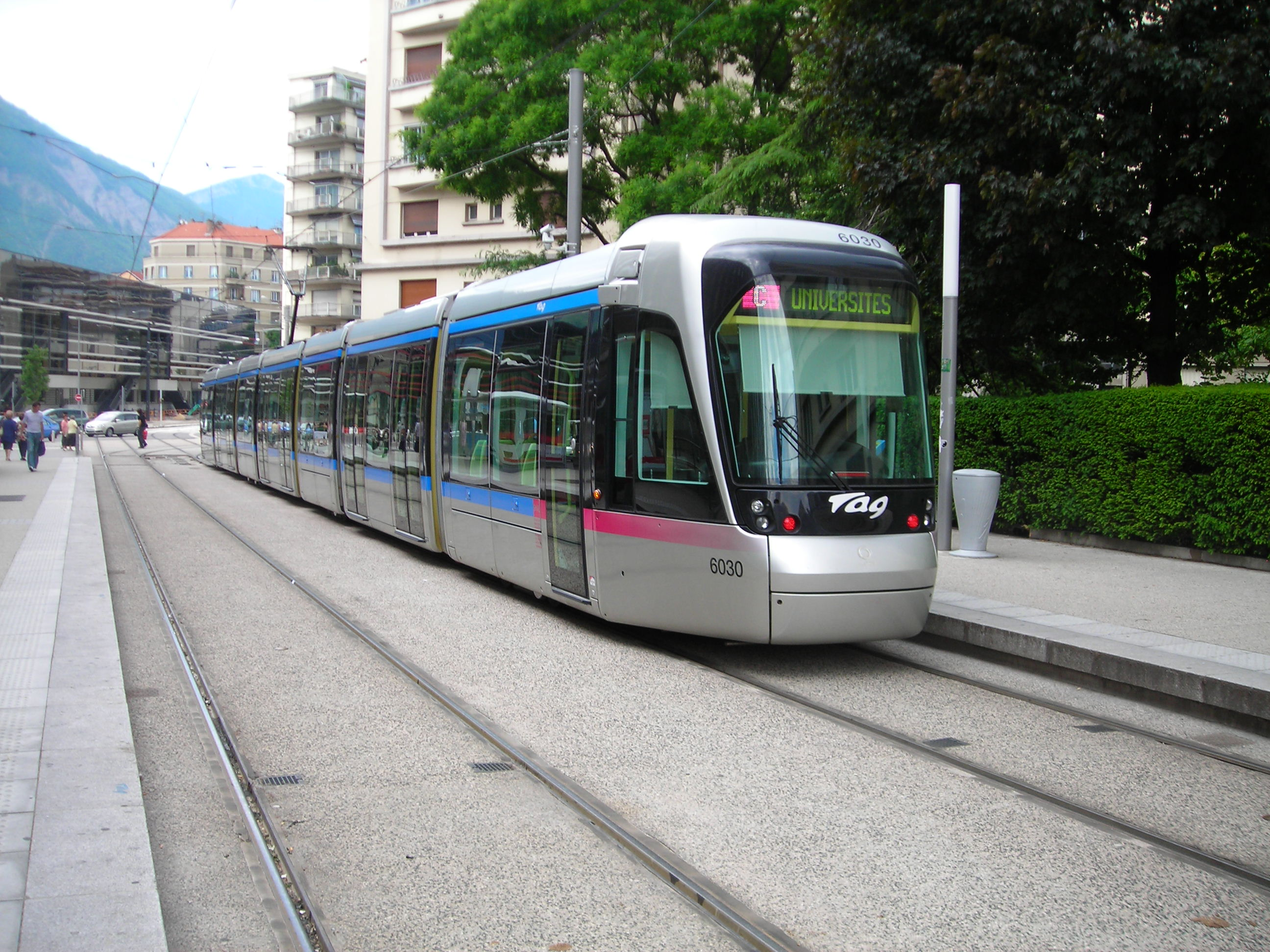 Tramway Alstom Citadis 402 sur la ligne C du réseau TAG de Grenoble à la station Chavant.